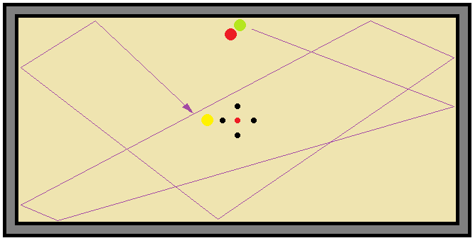 tiro complesso al biliardo da carambola